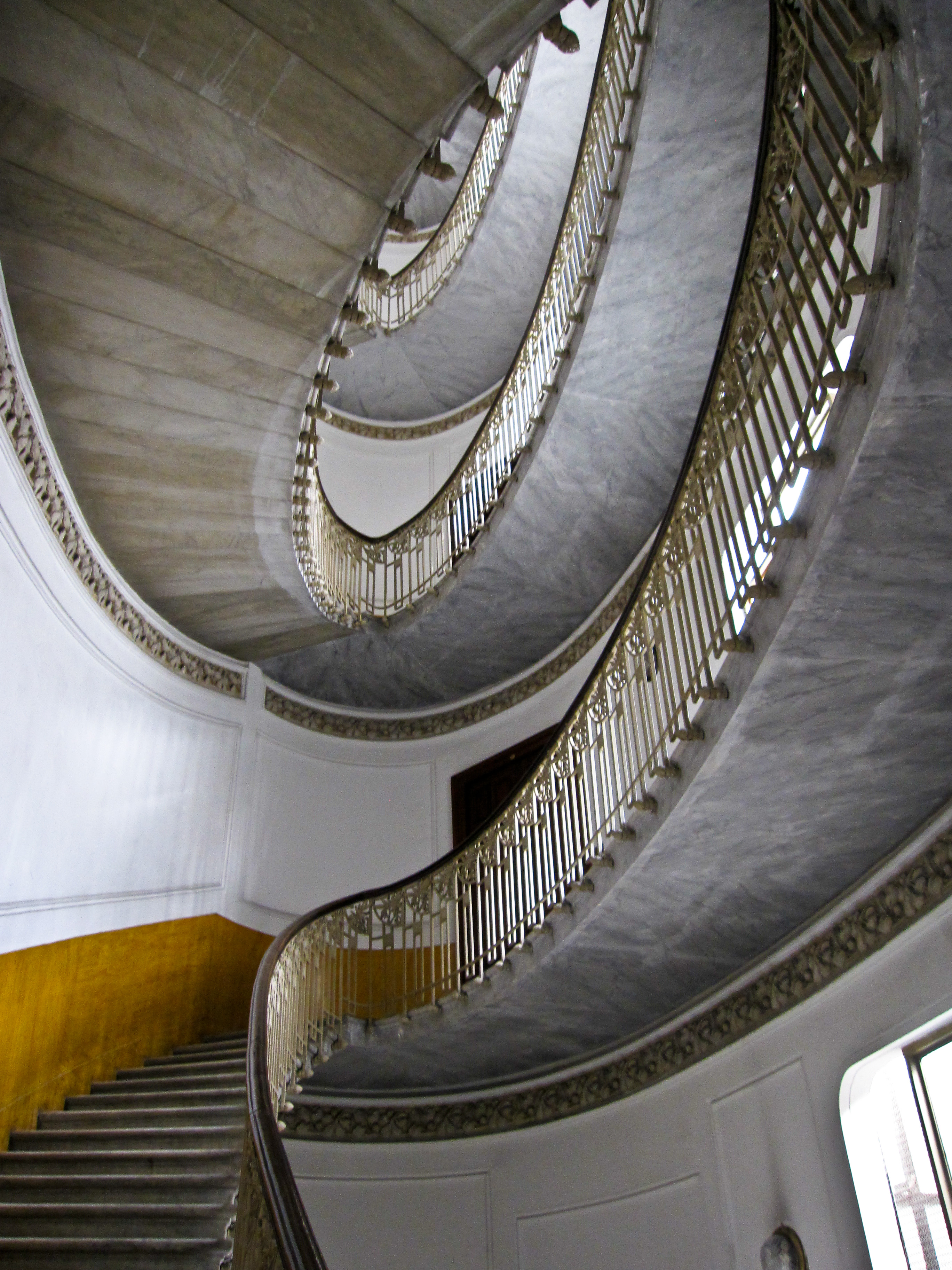 La scala principale ellissoidale, in marmo a sbalzo e con balaustra in ferro battuto.